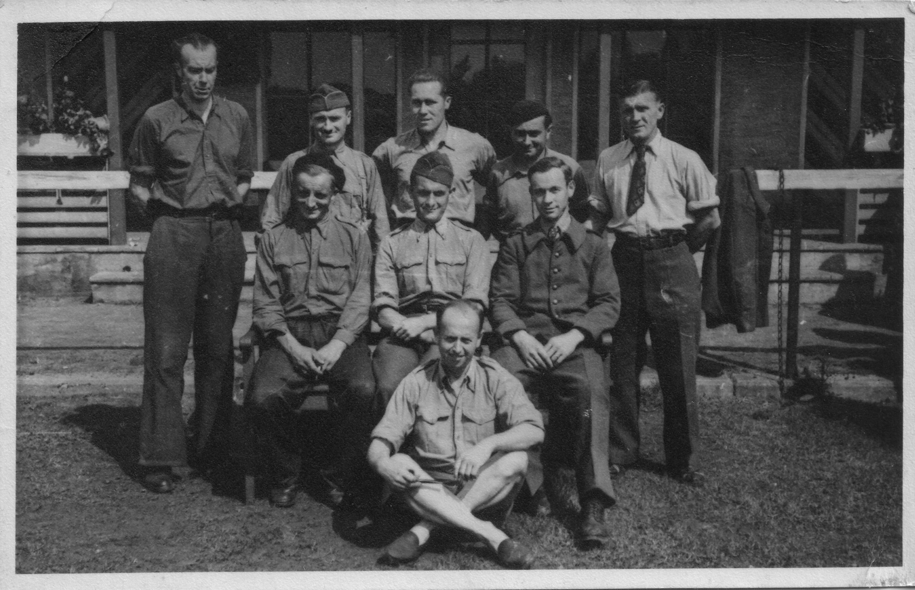 Prisonniers au Stalag XII A. A gauche, André Alfert.